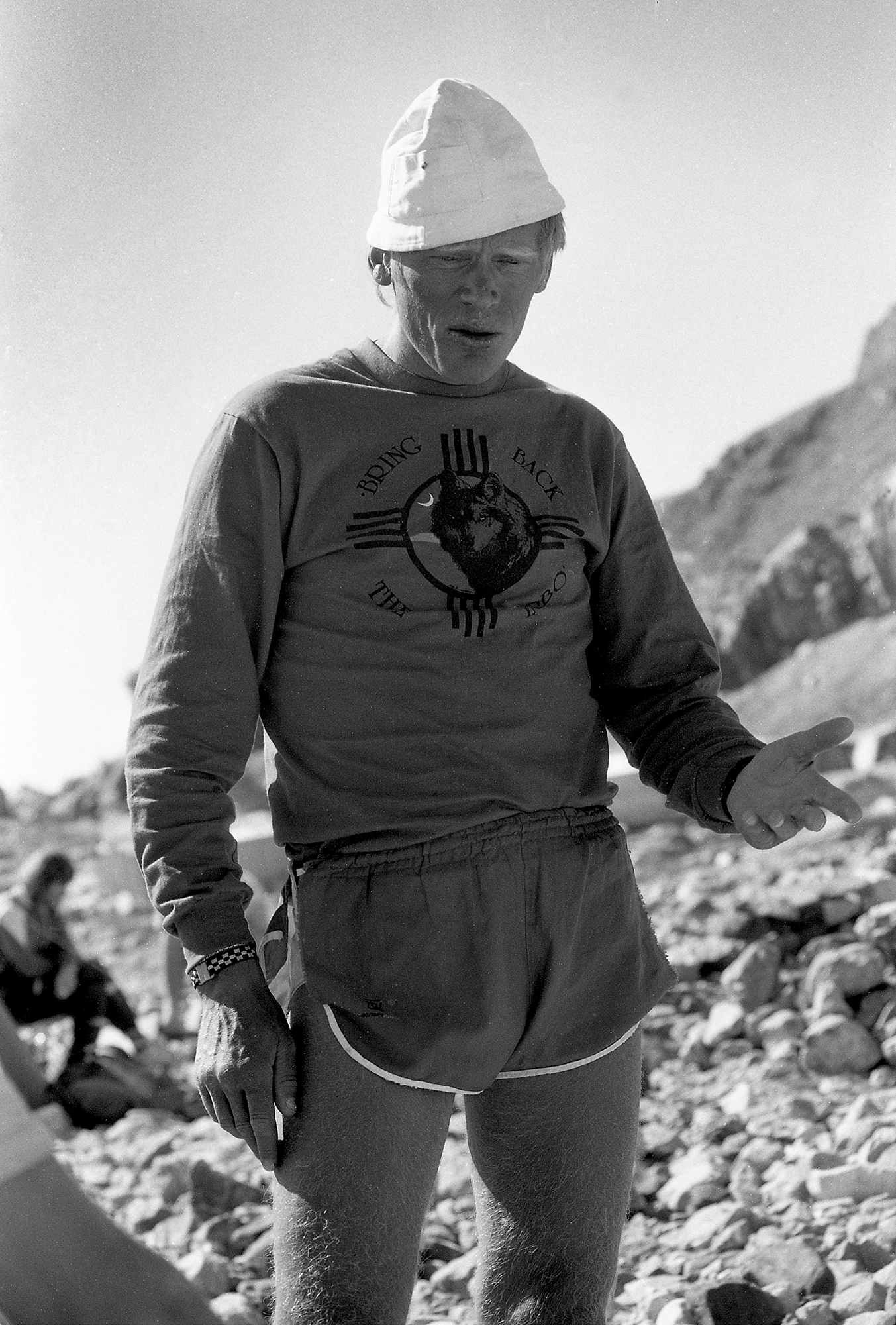 Anatoli Bukrejev. Raamatu „Tõus“, traagilised ambitsioonid Everestil, üks autoritest.